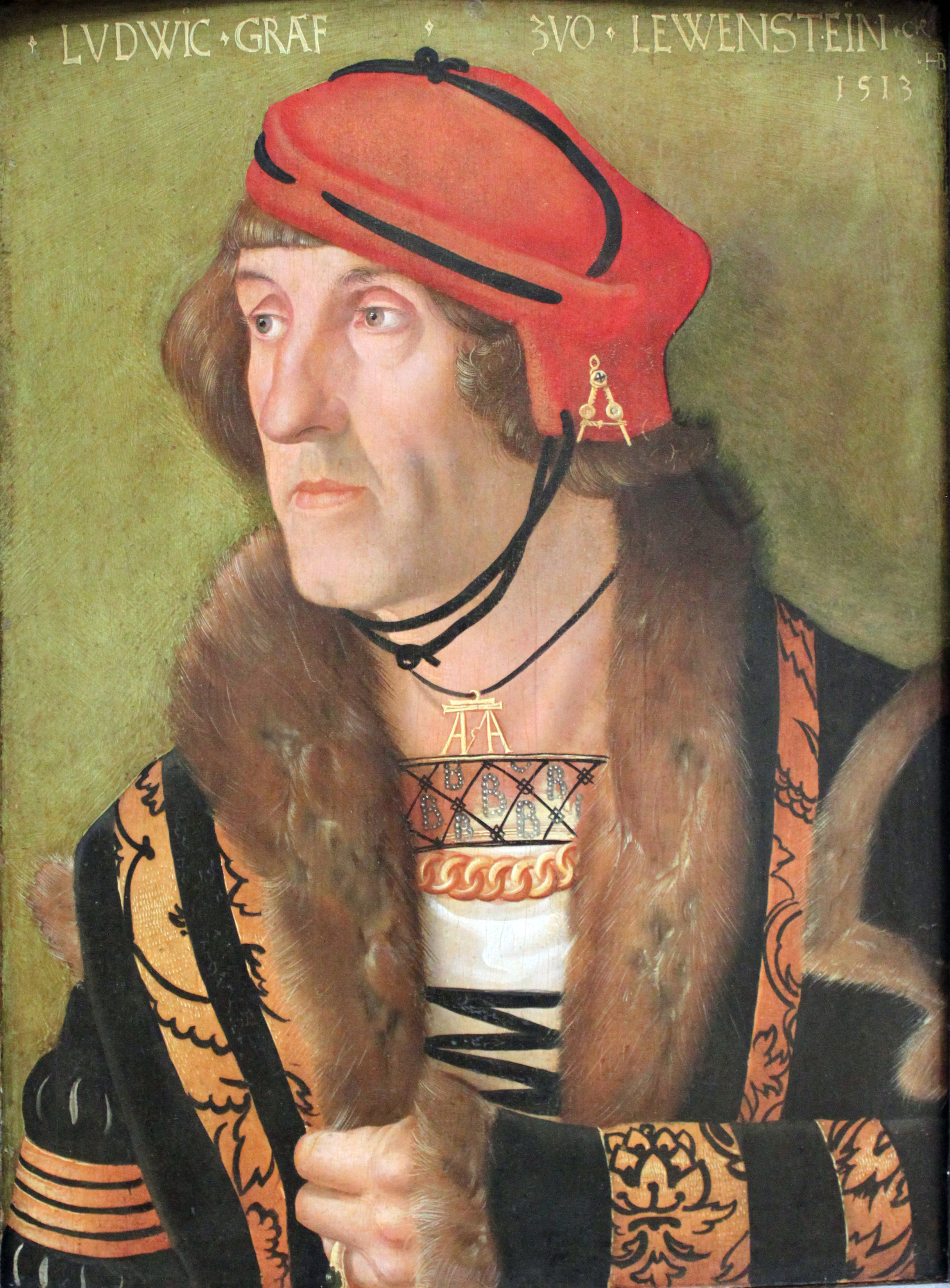 Bildnis des Ludwig Graf zu Löwenstein (1463-1524)Ludwig Count of Löwensteinlabel QS:Lru,"Людвиг Граф Löwenstein" label QS:Lde,"Ludwig Graf zu Löwenstein" label QS:Len,"Ludwig Count of Löwenstein"